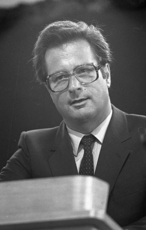 Bundespräsident Karl Carstens besucht Bundesnachrichtendienst in Pullach